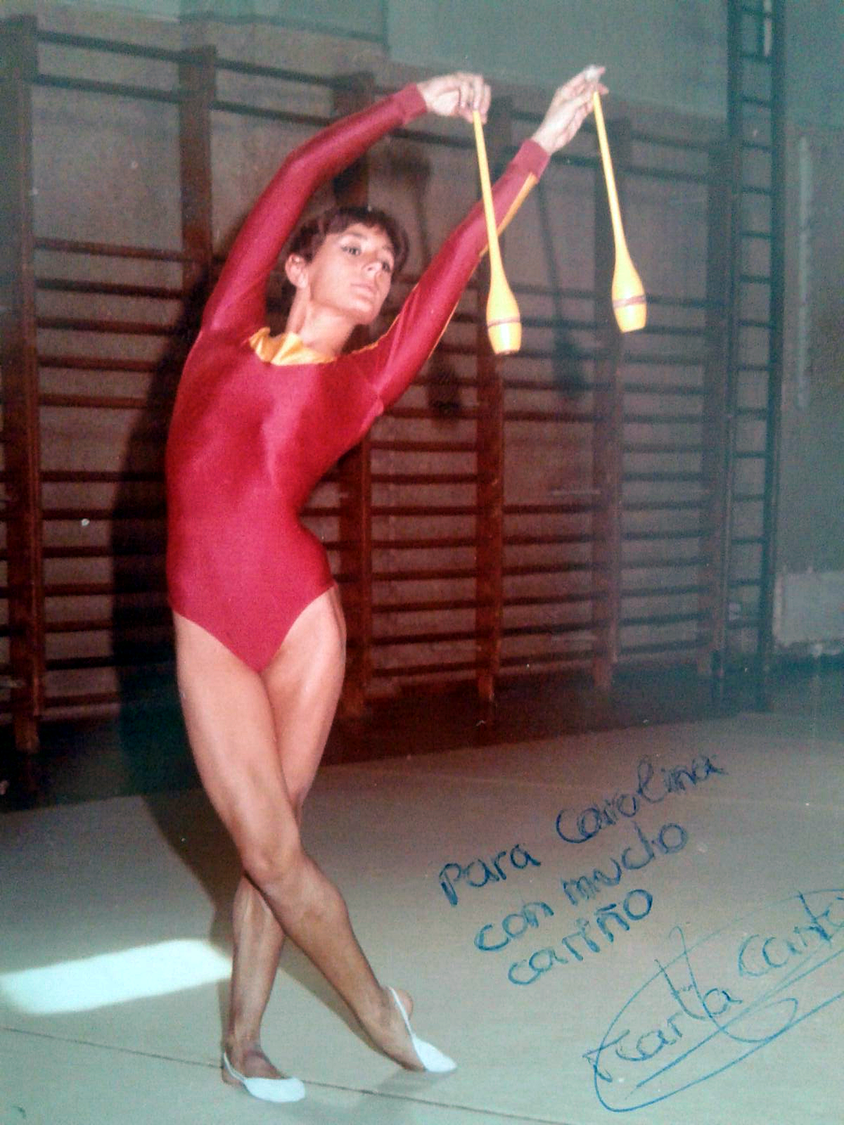 La gimnasta española Marta Cantón en 1983 en el Gimnasio Moscardó de Madrid.